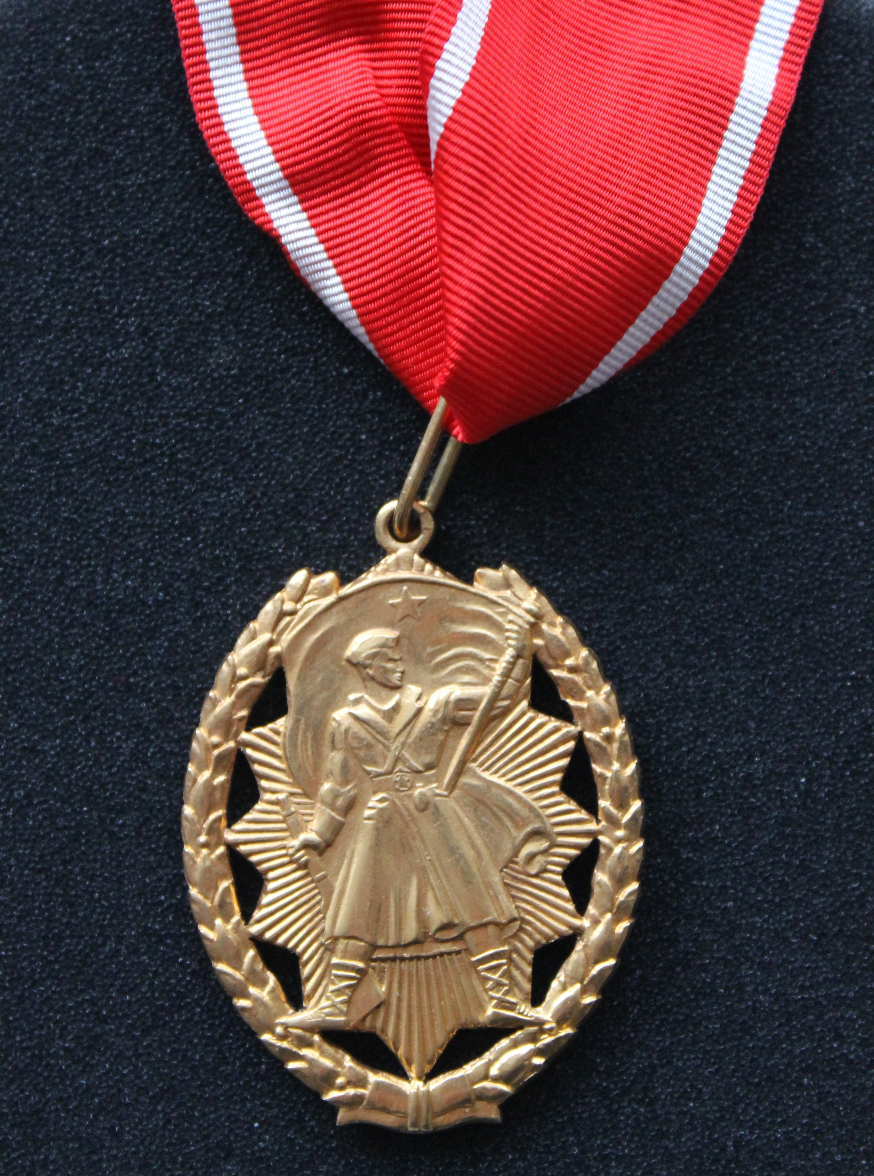 Орден народног хероја